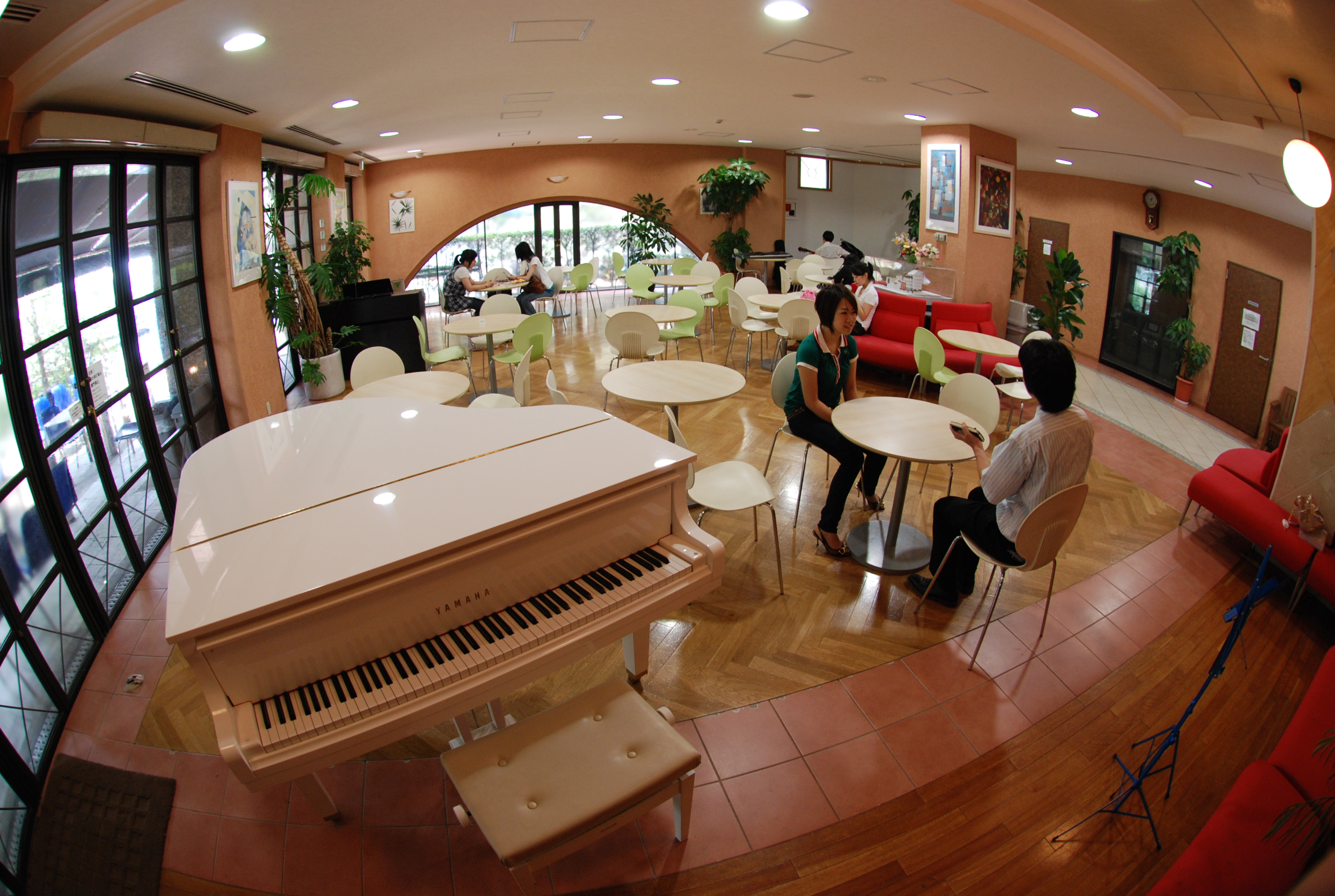 １Ｆエントランスホール・オアシス